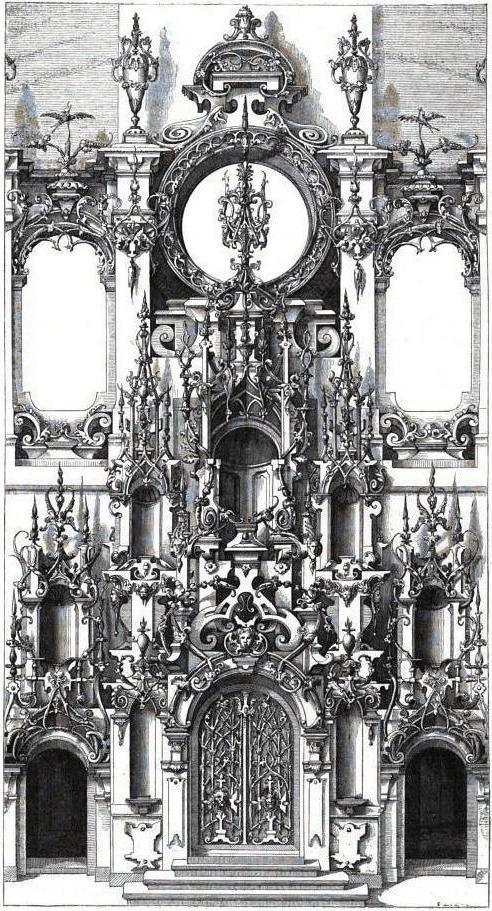 "Les Grandes Chapelles de Dietterlin".